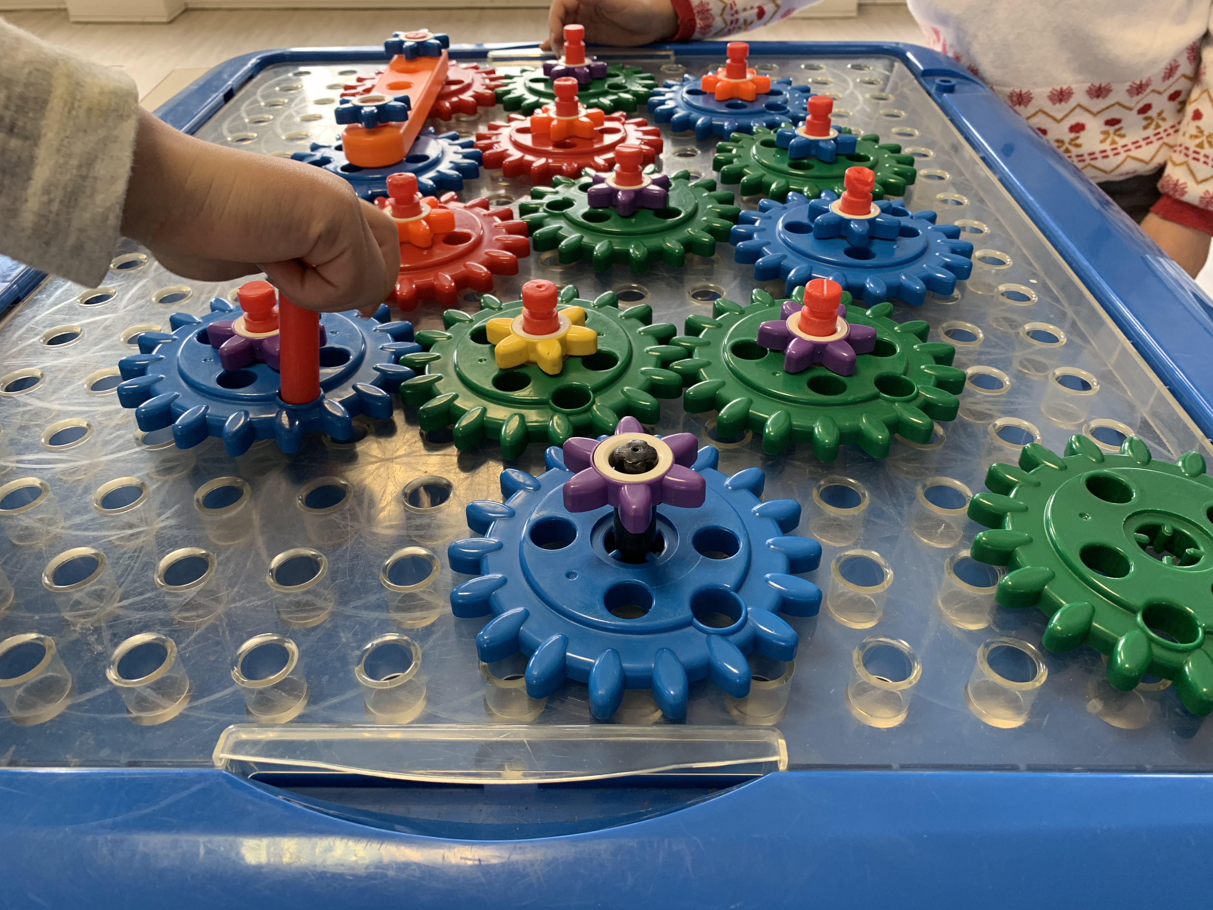 EbulliScience (Vaulx-en-Velin).